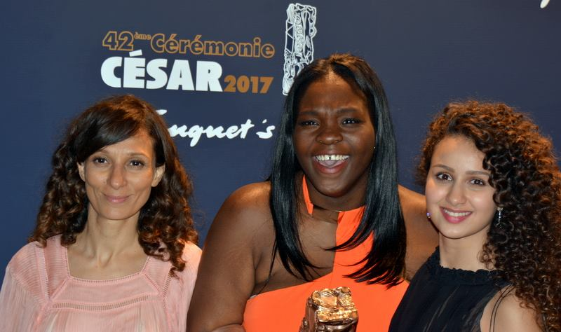 Houda Benyamina, Deborah Lukumuena et Oulaya Amara à la cérémonie des César